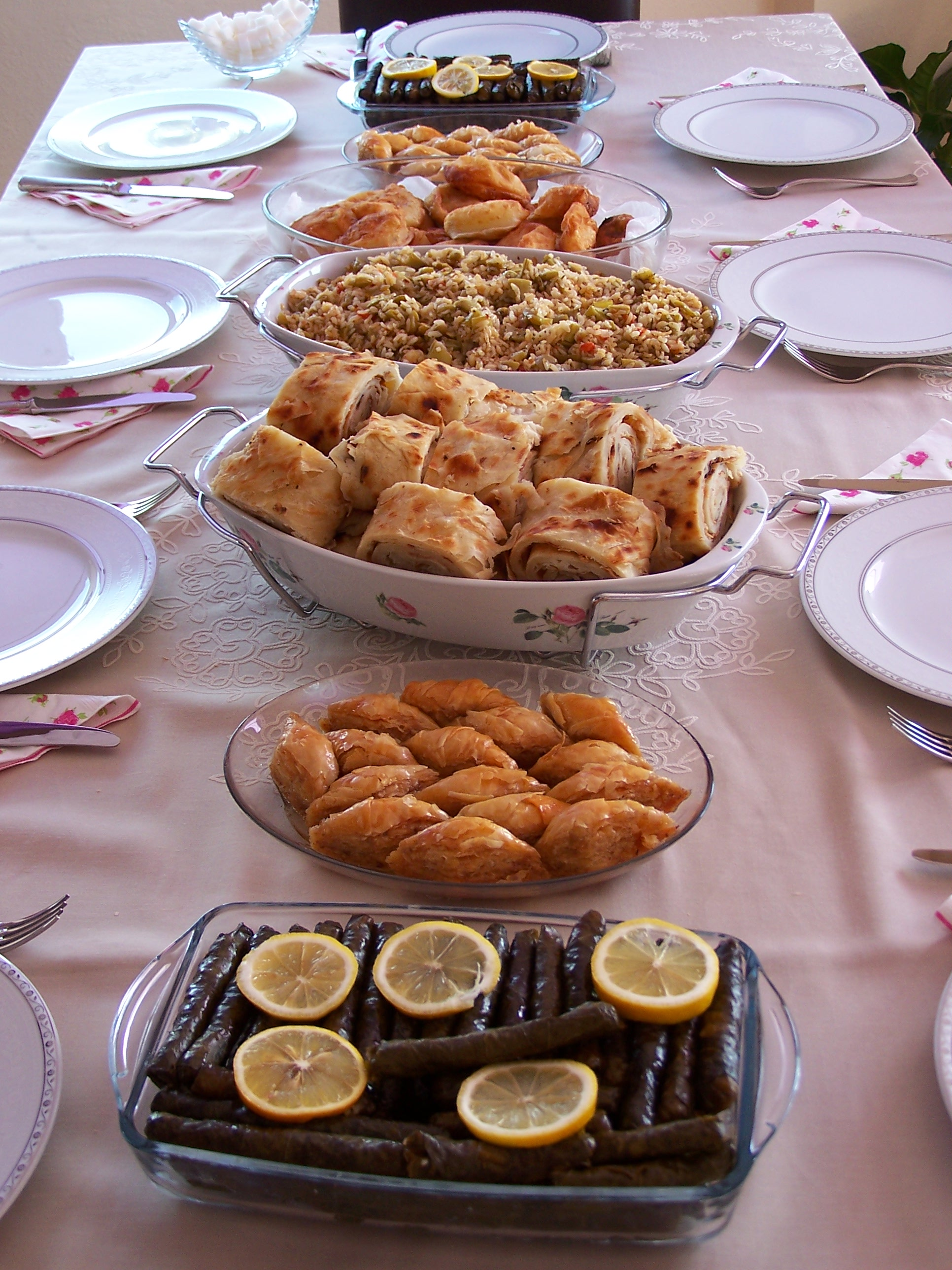 Dolma, Baklava, Gözleme, Pilav, Fincan-böreği, Sarma (Grape vine leaves), Borek